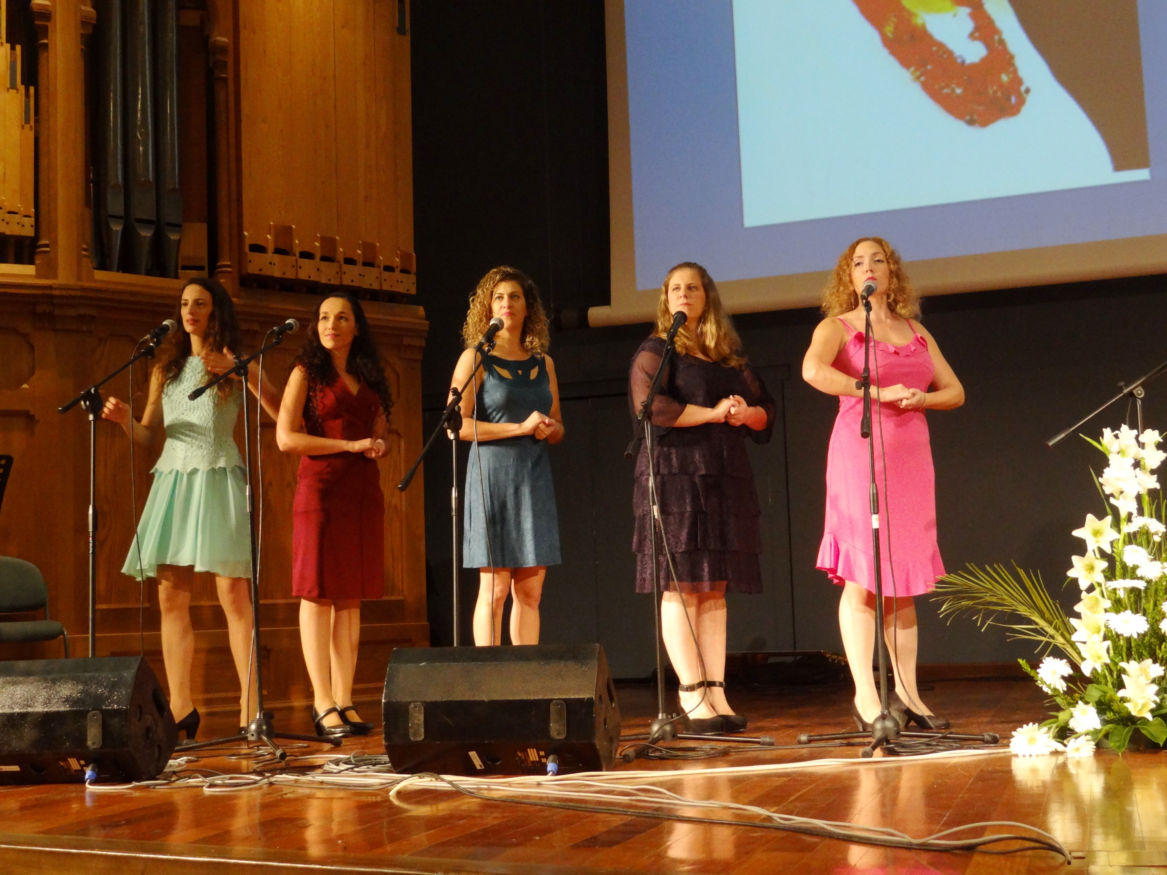 כרמל א-קפלה הוא הרכב מוזיקלי (אנסמבל) המבצע מוזיקה רב-קולית, ללא ליווי כלי נגינה (א-קפלה). בנות ההרכב כולן מאזור חיפה, ומכאן שמו. ההרכב במופע לנעמי שמר עם דן אלמגור במסגרת במסגרת סדרת הרצאות על נשים ופועלן שמתקיימת בתוכנית ללימודי נשים ומגדר באוניברסיטת חיפה ראו כאן